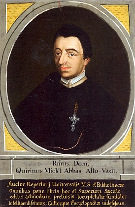 Dr. Quirin Mickl OCist. (1874 - 1937), Cisterciácký mnich, učenec a básník .